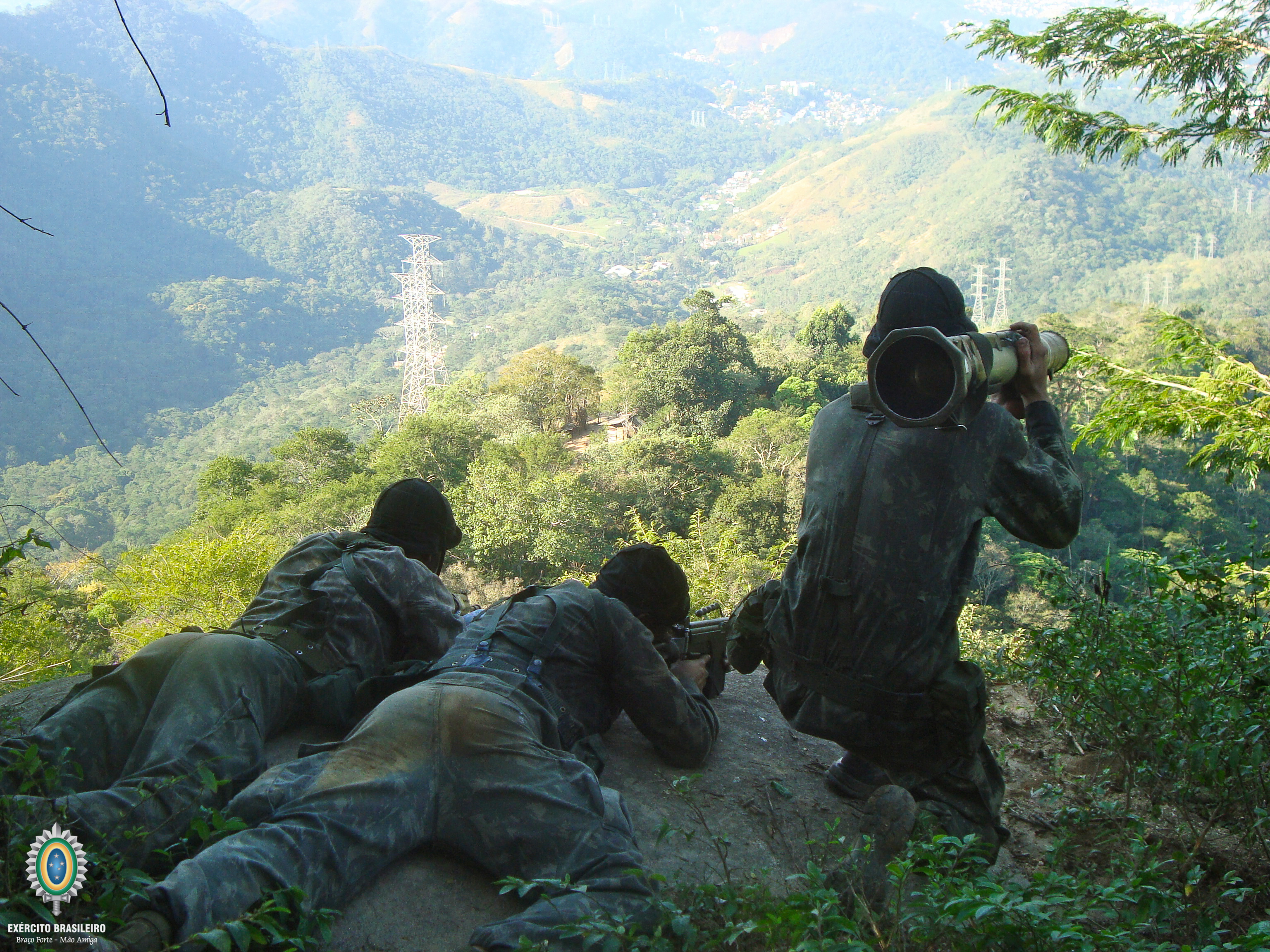 Comandos, Forças Especiais, combatente, Exército, Tiro instintivo caatinga, paraquedistas, atirador, sniper, mergulhadores